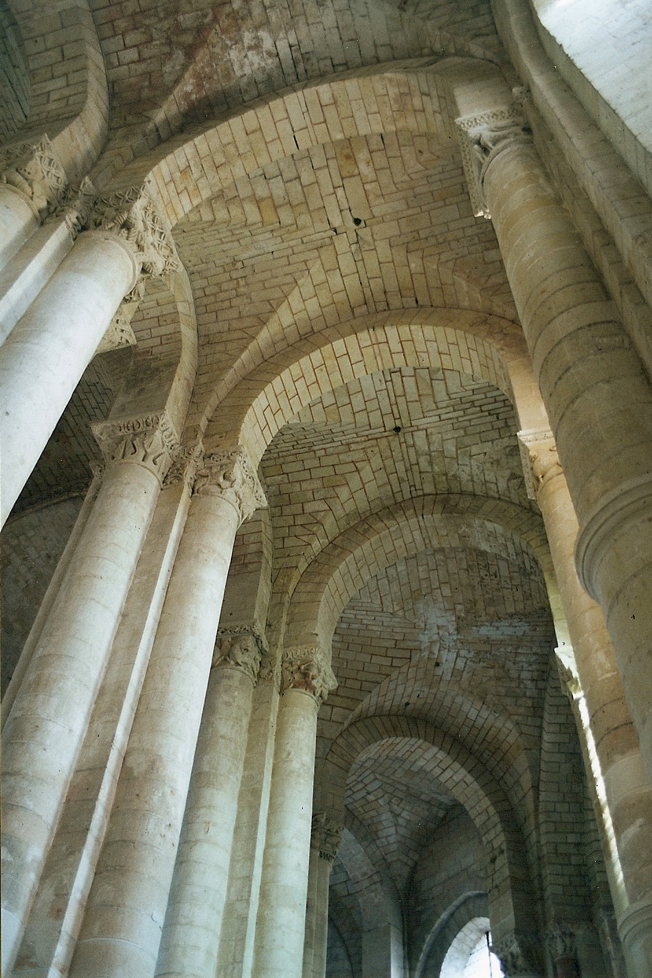 N.-D. Cunault, Südl. Chorumgang